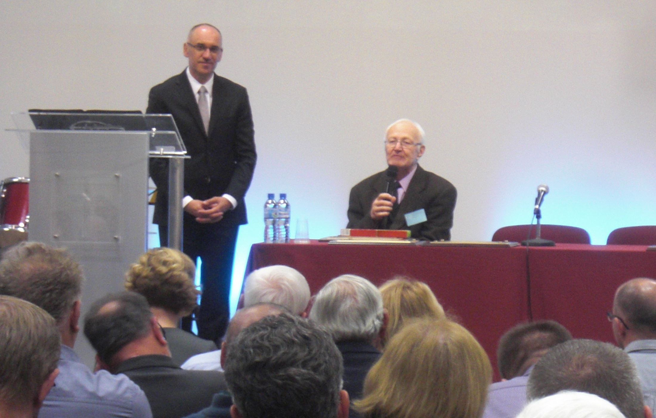 E. Czajko, Synod KZ, 2016-09-22; 82 urodziny